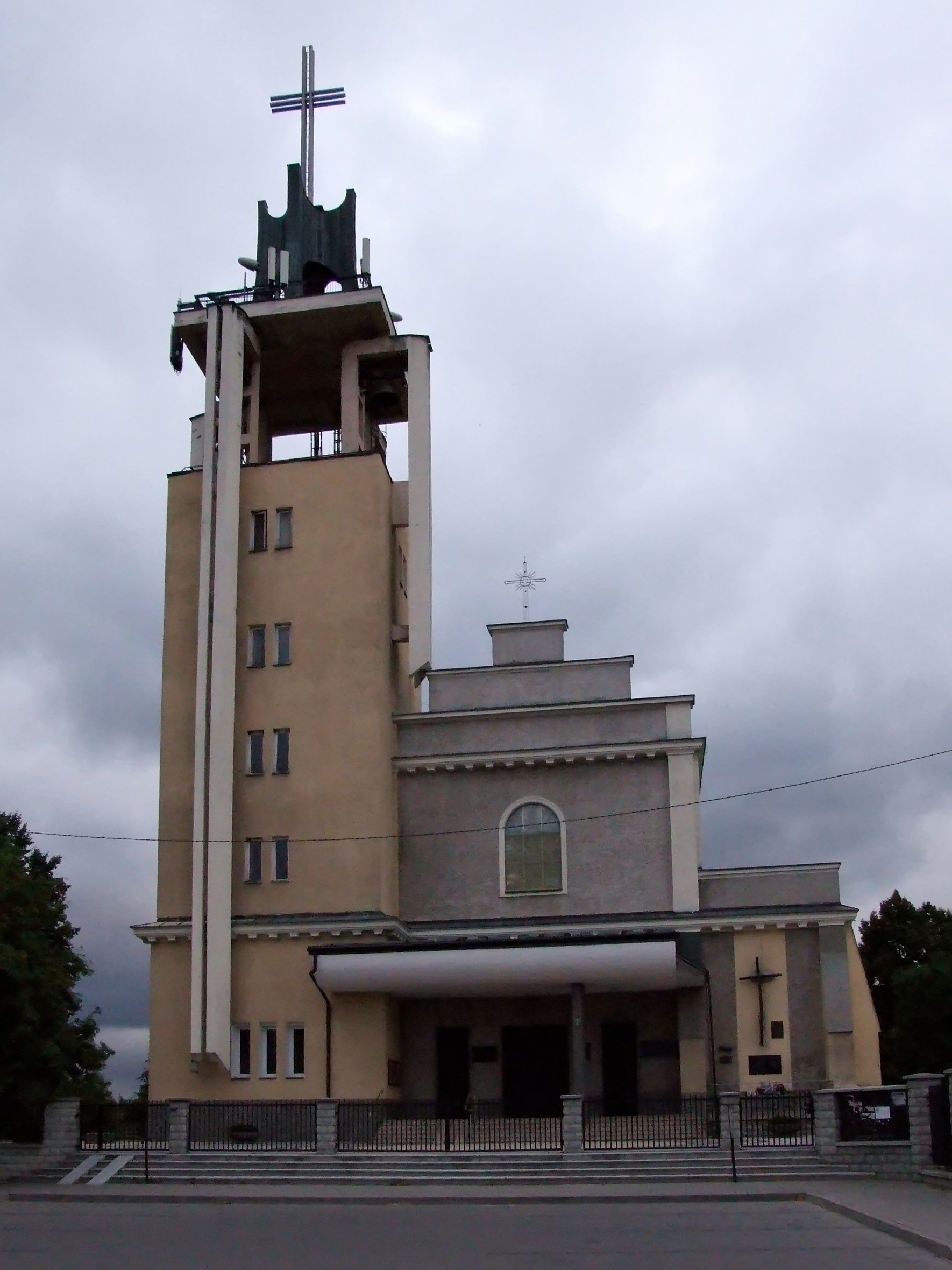 Kościół Św. Trójcy w Ząbkach